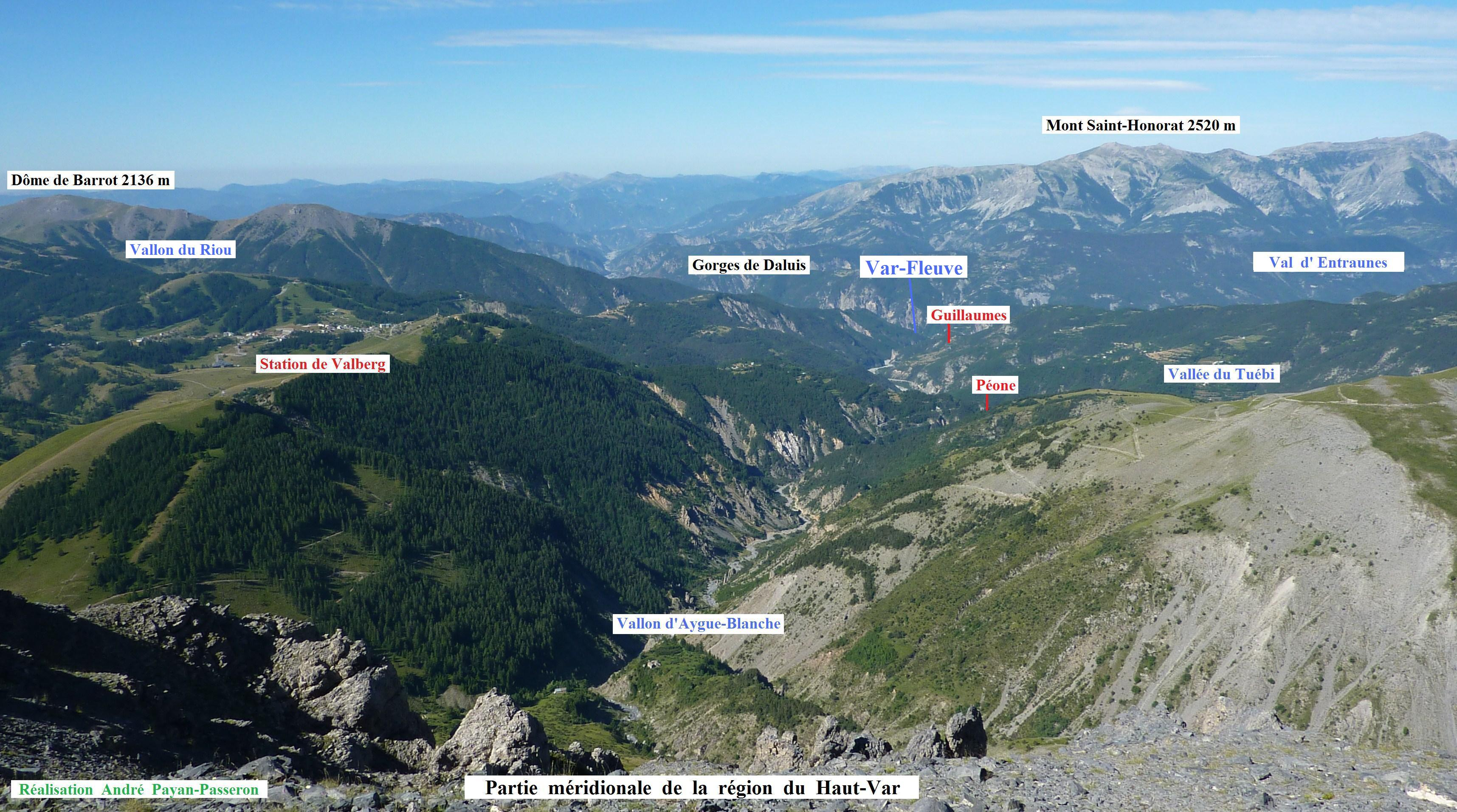 Prise du Nord-Est (sentier du Mont-Mounier), partie méridionale de la petite région du Haut-Var corrrespondant aux territoires des sept communes incluses dans la vallée supérieure du Var-Fleuve en amont des Gorges de Daluis.